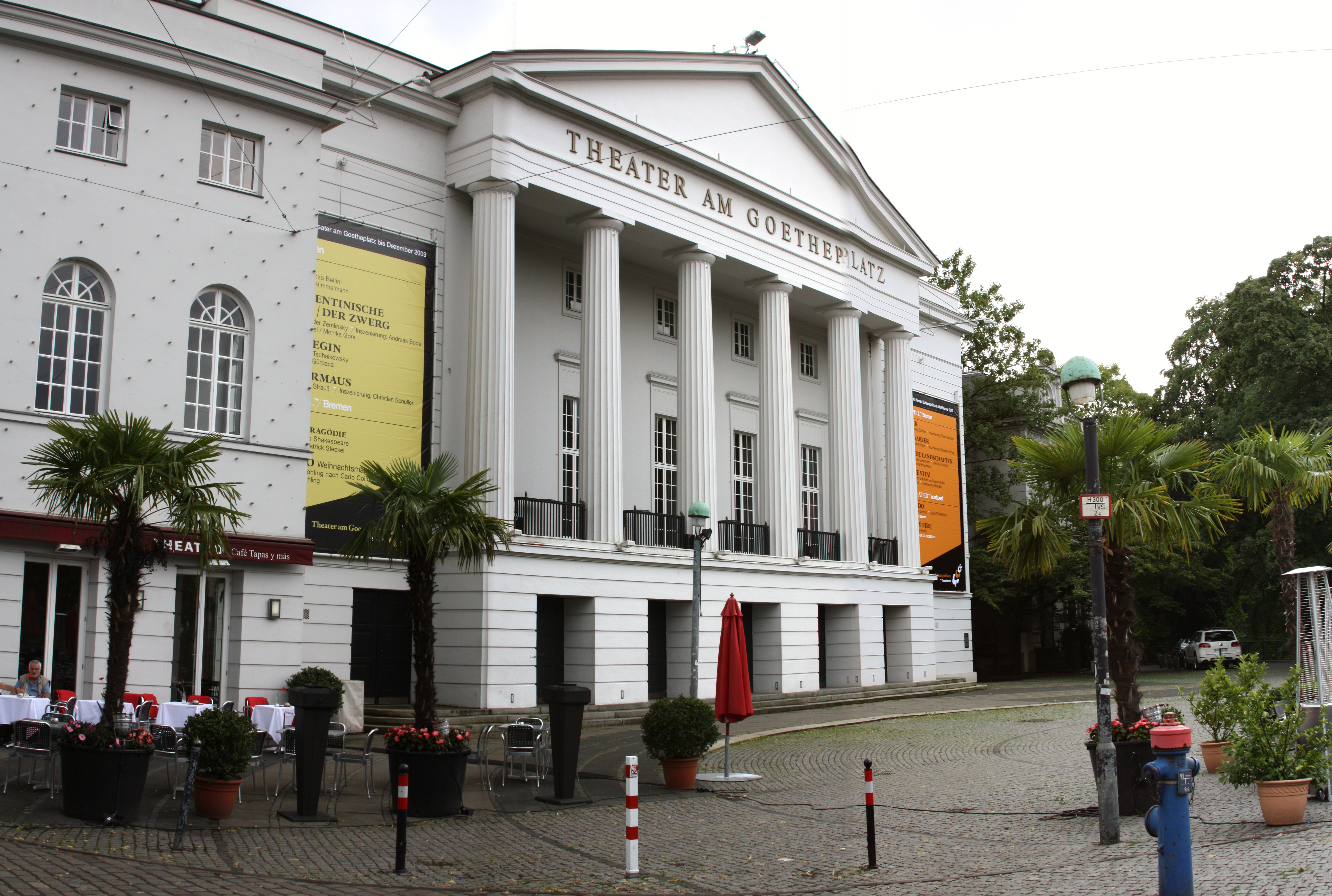 Bremen; Theater am Goetheplatz; GoetheTheater in Bremen; 2009